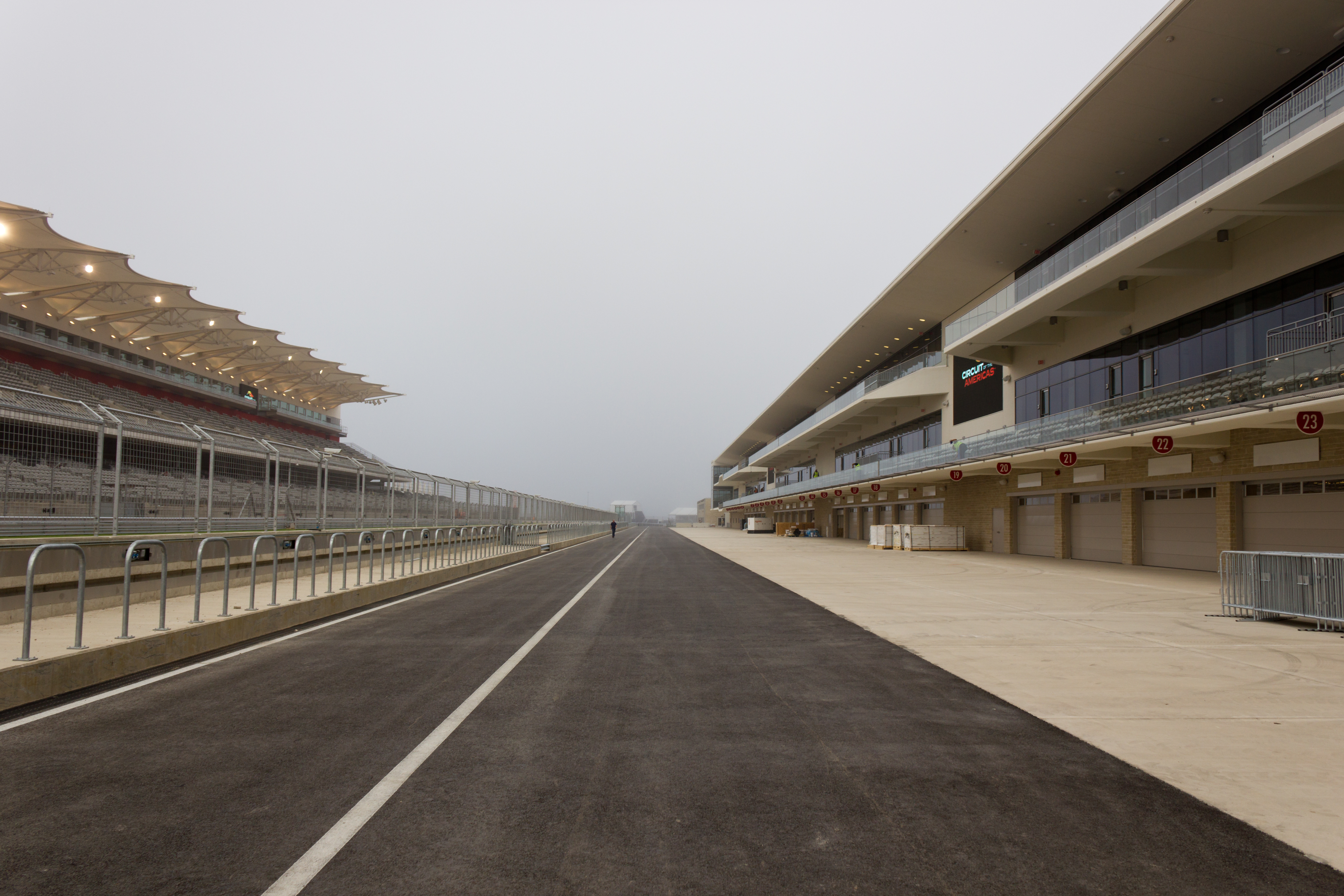 Pit Lane COTA